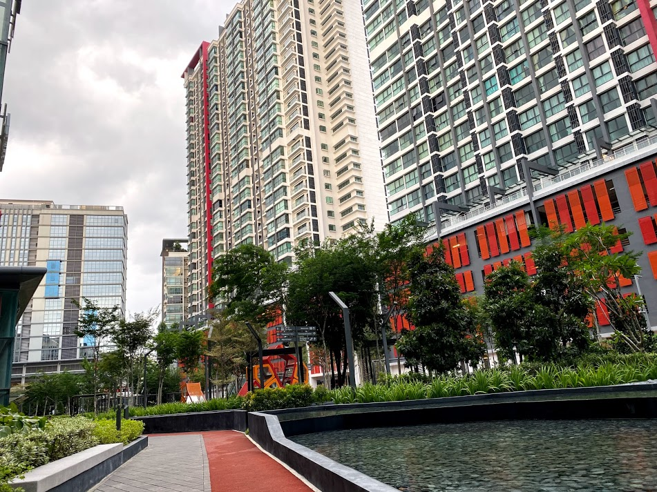 蕉賴偉樂城景色